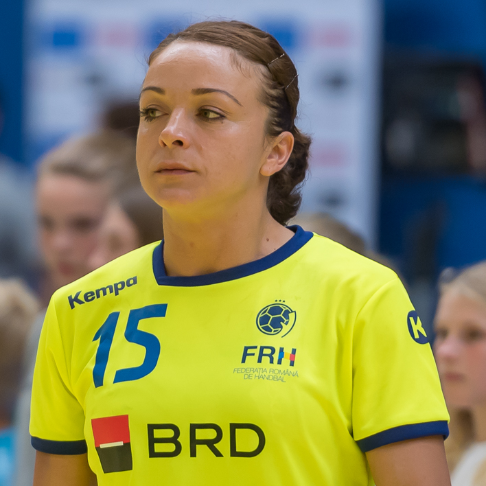 Damenhandball WM-Qualifikation Playoff Österreich vs Rumänien am 13. Juni 2017 in Stockerau. Bild zeigt Valentina Neli Ardean Elisei (ROU).